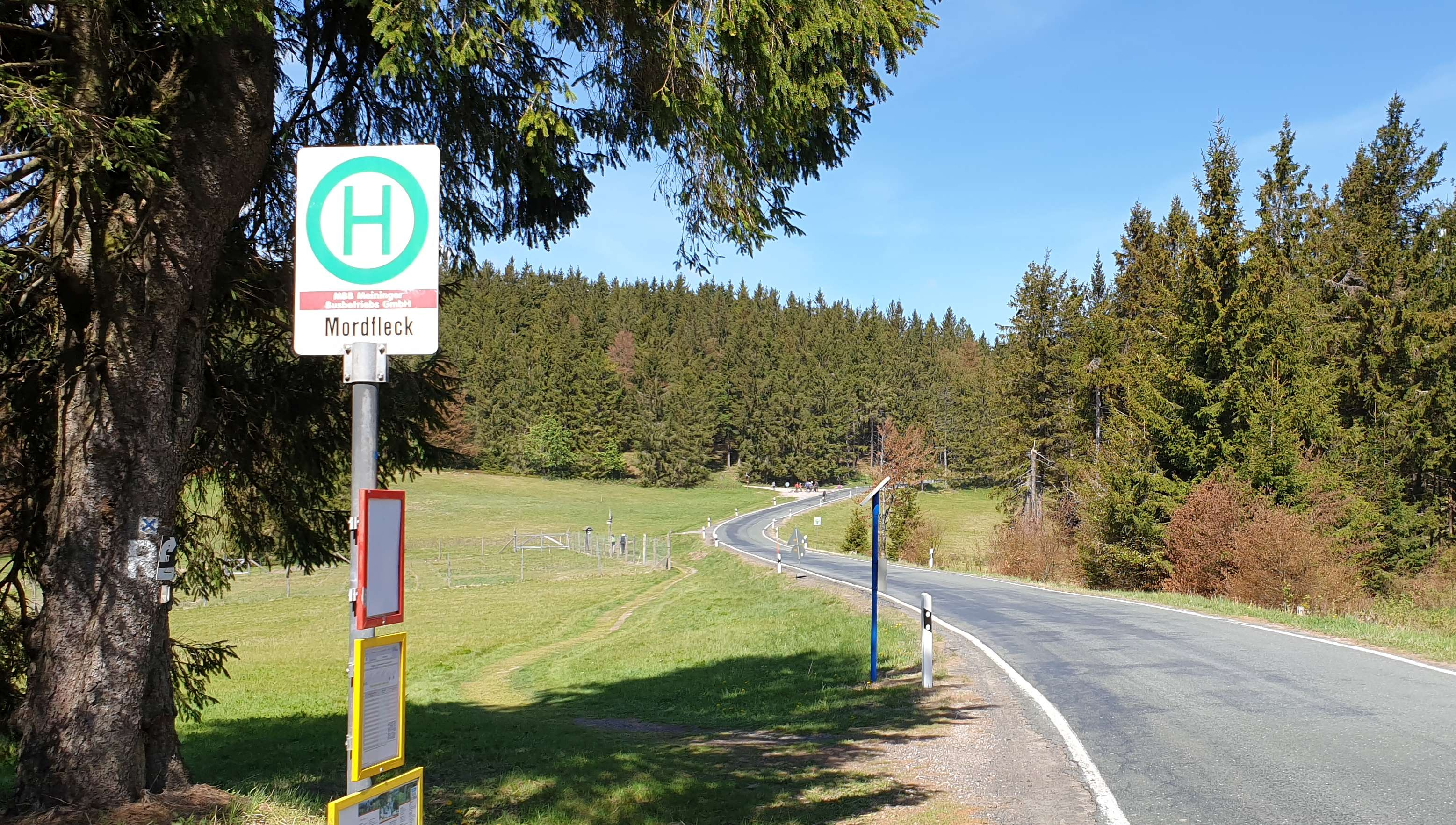 Foto vom Mordfleck in DE-TH, eine Sattelformation am Rennsteig